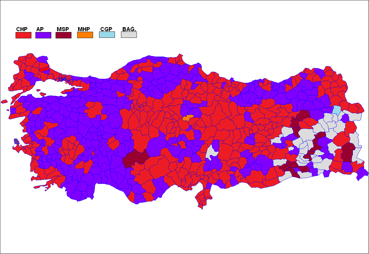 1977 genel seçimleri sonuçlarının Türkiye ilçeler haritasında gösterimi.